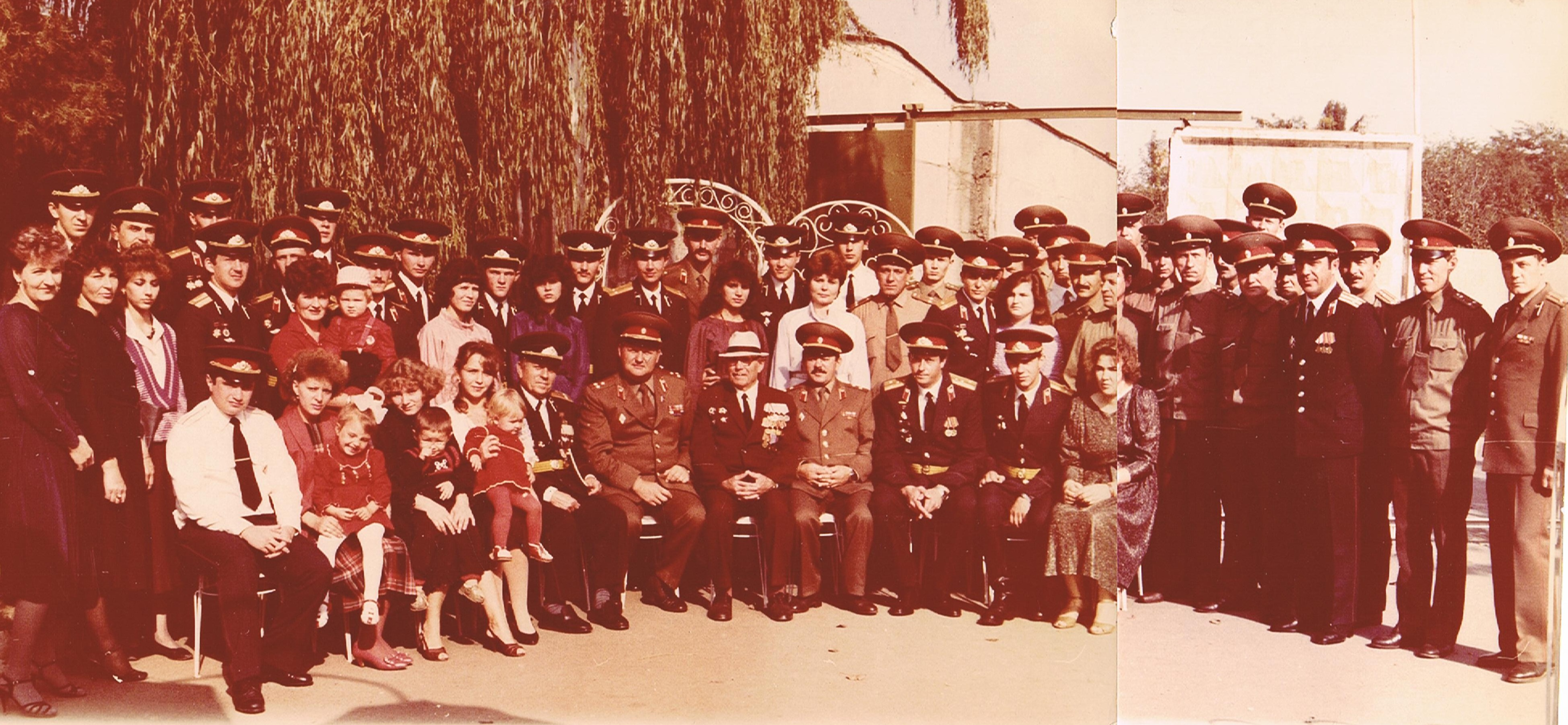 9 мсд семьи. Майкоп 1988